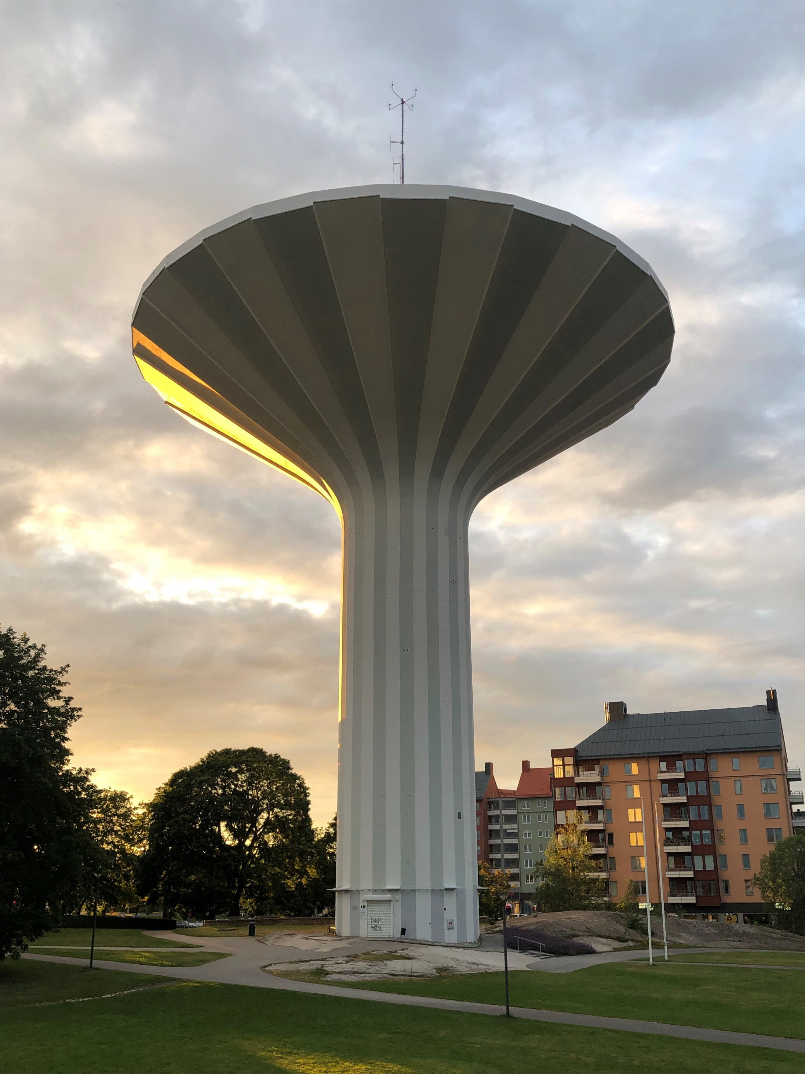 Vattentornet Svampen i Örebro sedd från söder. Tagen den 7 juli 2019